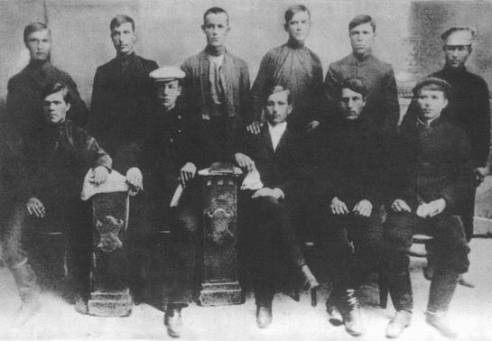 1907. Группа анархистов Гуляйполя. Стоят: А. Семенюта, Л. Кравченко (Грабовой), И. Шевченко, П. Семенюта, Е. Бондаренко, И. Левадный. Сидят: Н. Махно, В. Антони, П. Онищенко, Н. Зуйченко, Л. Коростылев